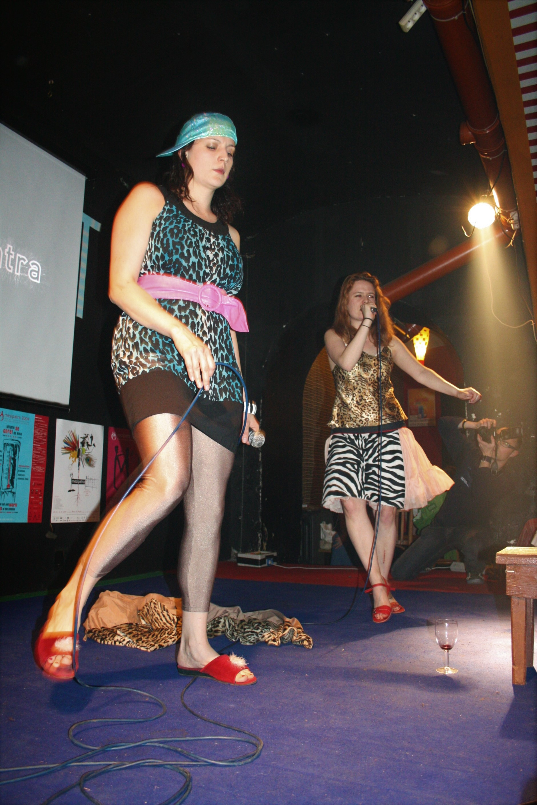 Brno, Rooseveltova 591/11, Club Desert. Vystoupení dvojice Čokovoko na podporu filmového festivalu Mezipatra.